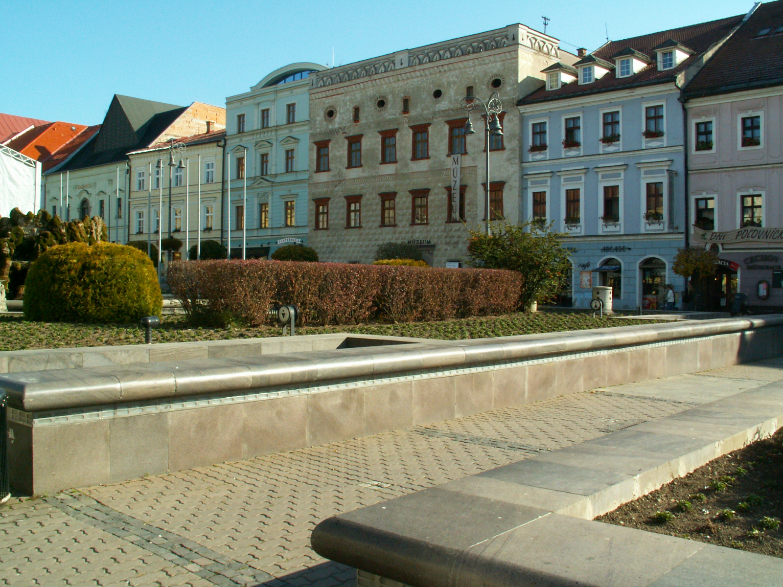 Námestie SNP - Thurzov dom (B. s prava)